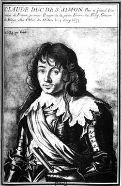 Claude de Rouvroy de Saint-Simon, duc de Saint-Simon (1er, 1635), vicomte de Clastres, baron de Benais, seigneur de Ferté-Arnaud et de Beaussart. Gouverneur de la Ville, Château et Comté de Blaye, Saint-Germain-en-Laye et de Versailles. Né le 16 août 1607 Décédé le 3 mai 1693 - Paris, 75 À l'âge de 85 ans